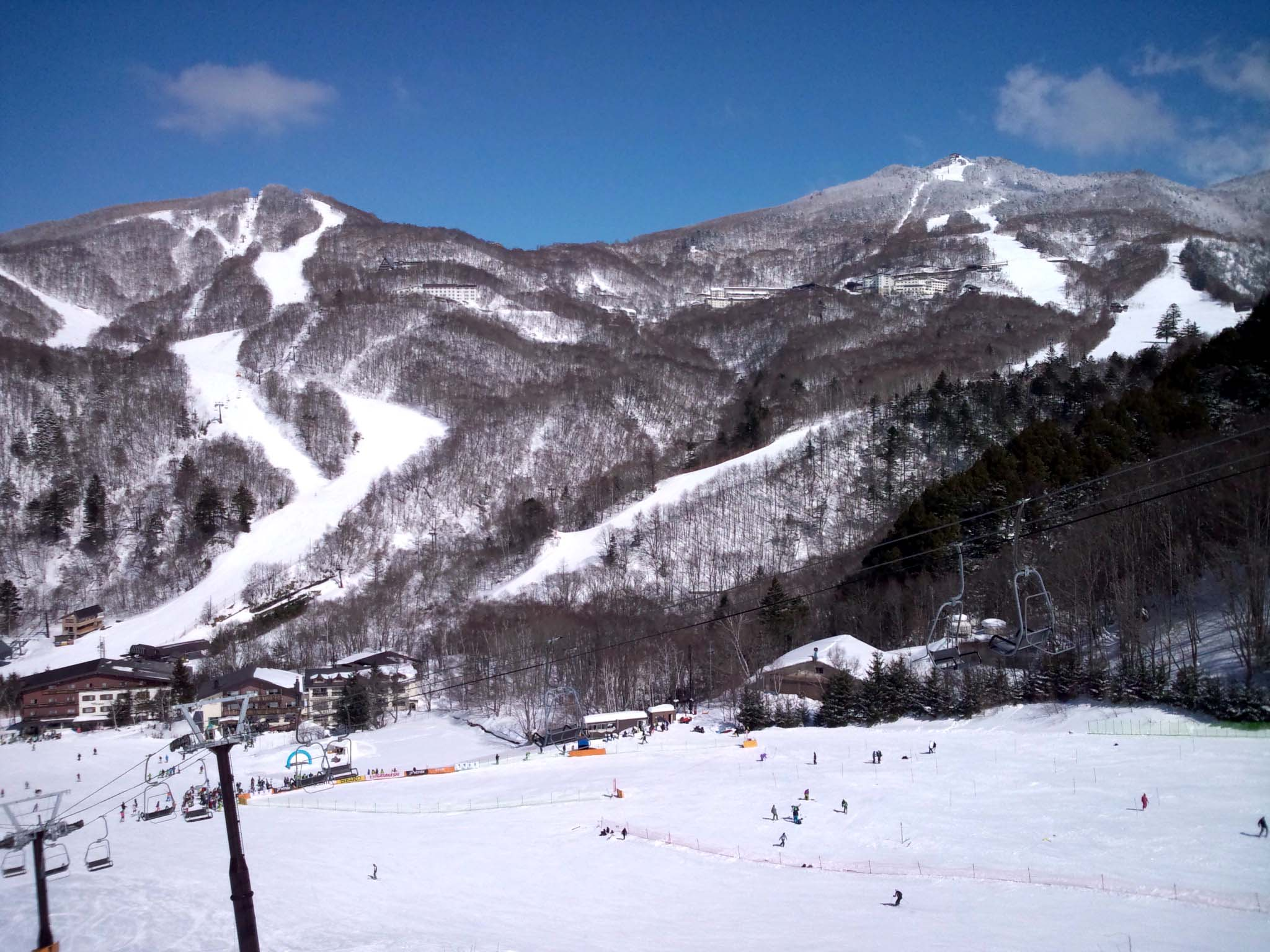 西館山(左)と東館山(右)。ジャイアントスキー場から撮影。左の西館山にあるのが西館山スキー場。右奥の東館山にあるのが発哺ブナ平スキー場や東館山スキー場。